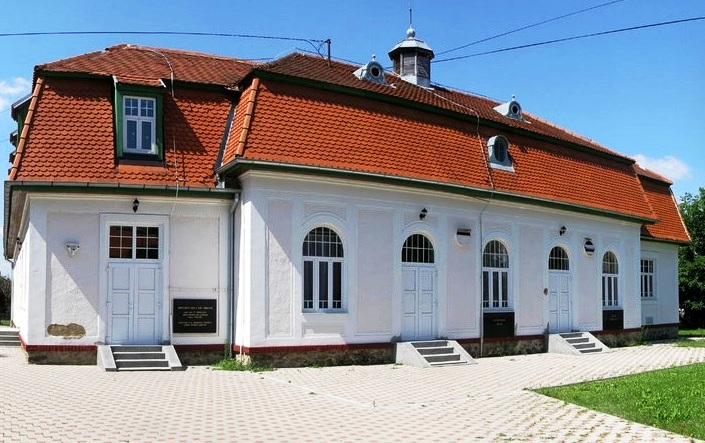 Fotografija Doma kulture u Đurđenovcu, Hrvatska (zgrada lokalno poznata i kao Radnički dom/Arbeitersheim).